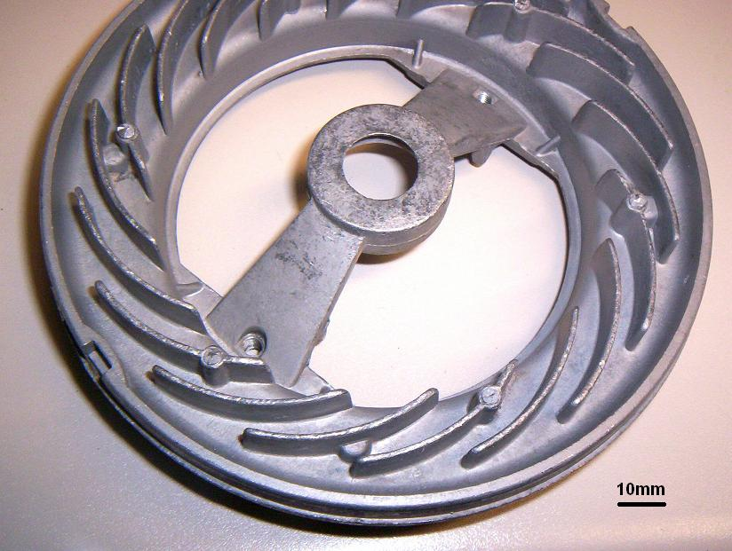 typisches Aluminium-Druckguss-Teil (Teil eines Staubsauger-Gebläses)